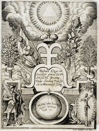 Tarasowicz, Leontij (fl. 1688-1710). [Herb rodziny Ogińskich. Inc.: Wychodź księgo na swiatłosć[!] przez Ogińskich Bramę [... . Europeana. Retrieved on 2015-03-05.